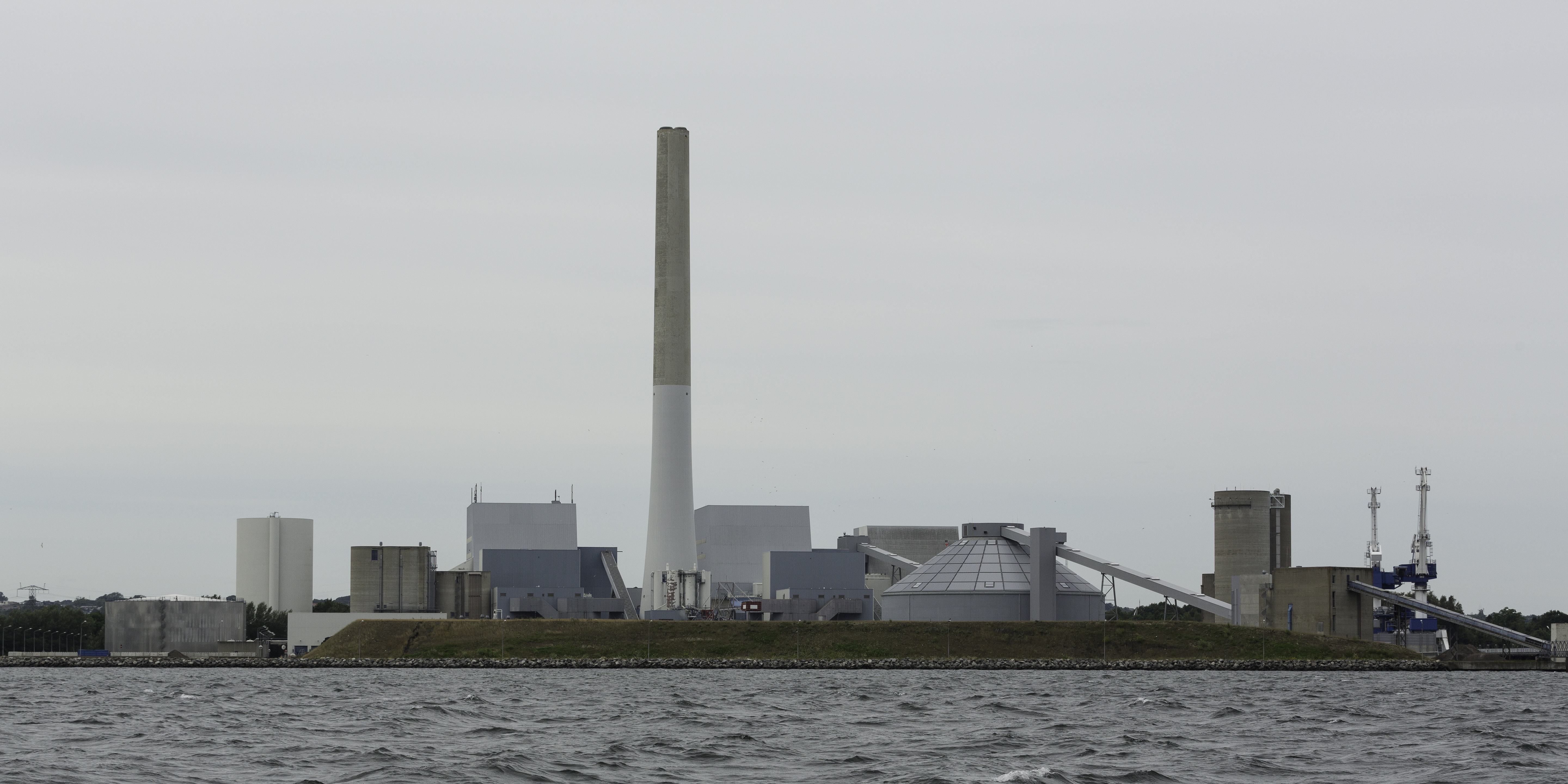 Studstrupværket set fra vandsiden